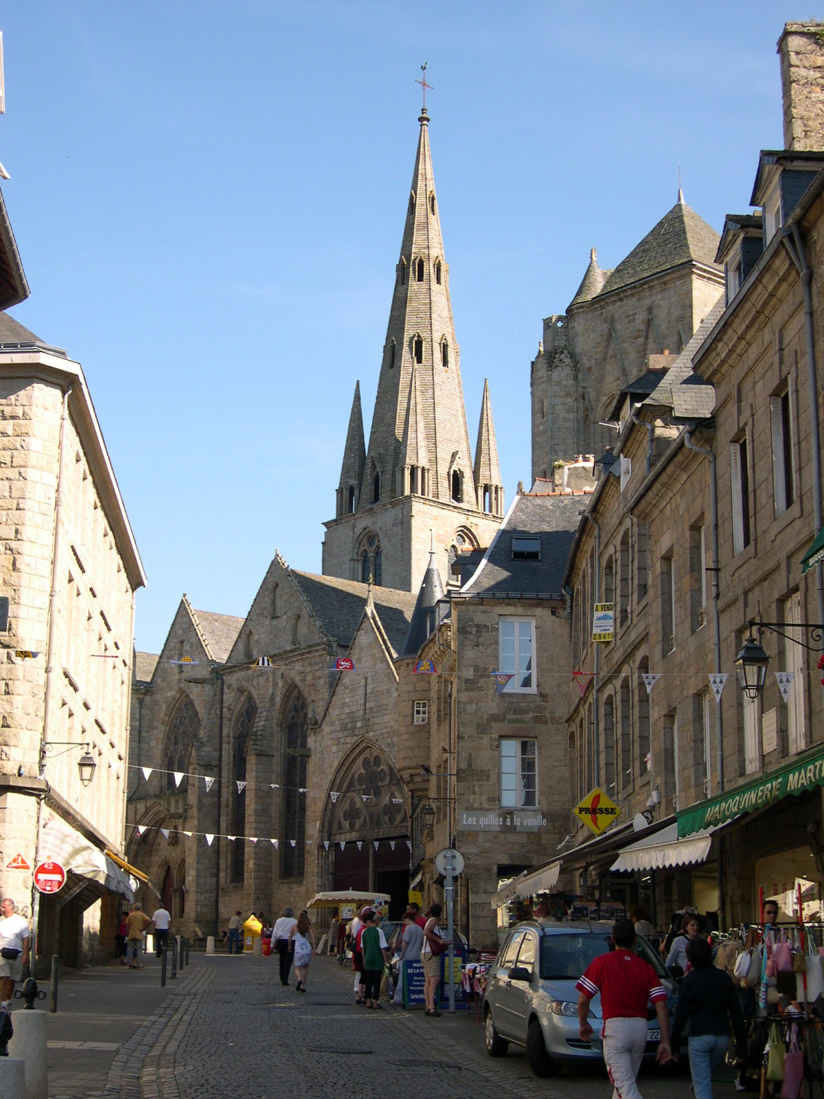 Flanc nord de la basilique Notre-Dame de Bon-Secours de Guingamp - Côtes-d'Armor - France .